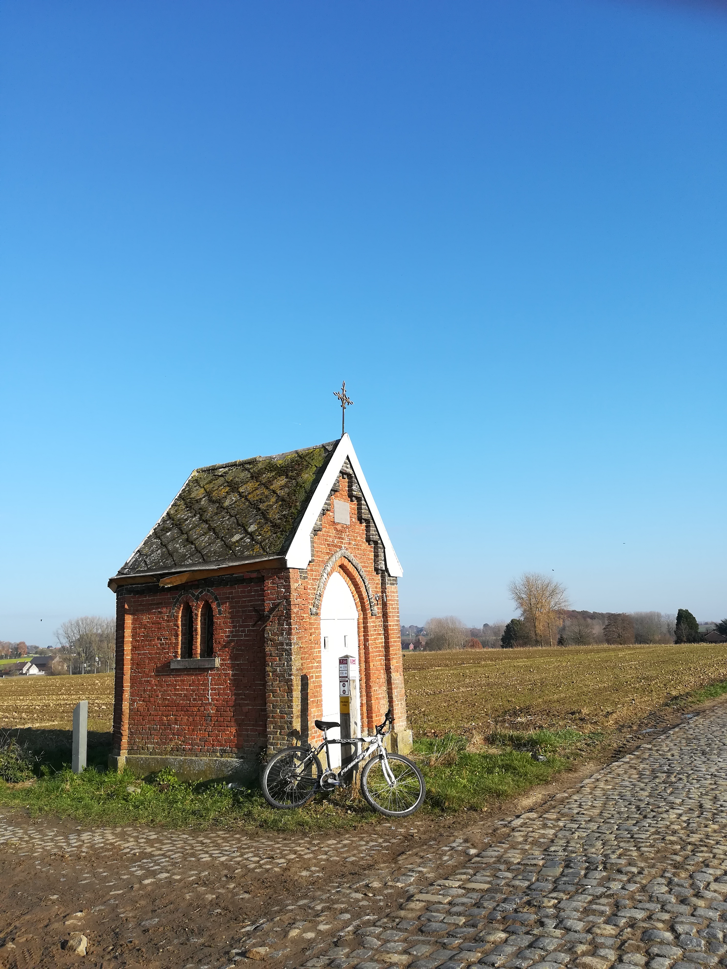 Foto vanuit NW van Viergatenkapel te Oetingen